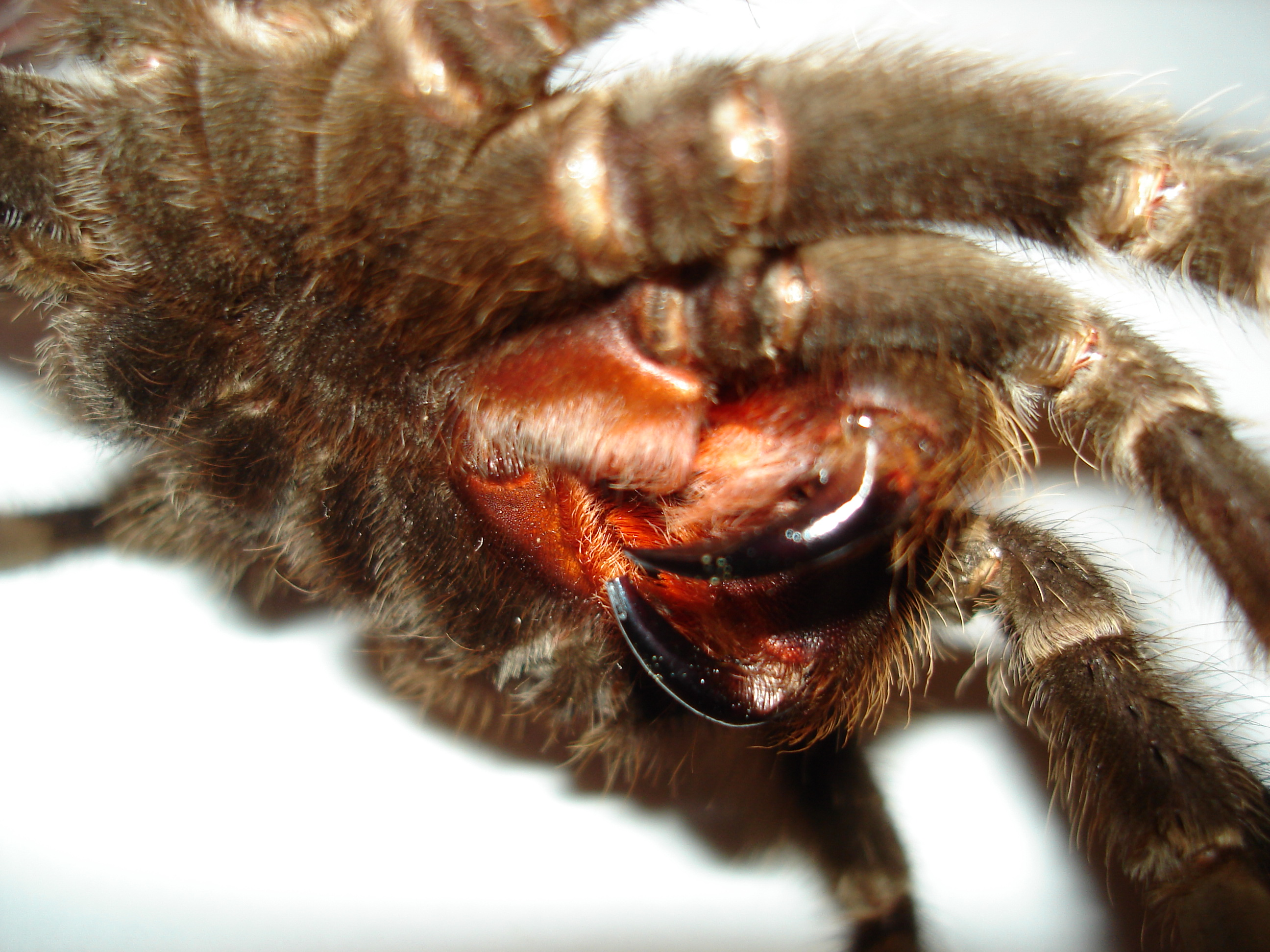 Lasiodora parahybana, adult female, chelicerae